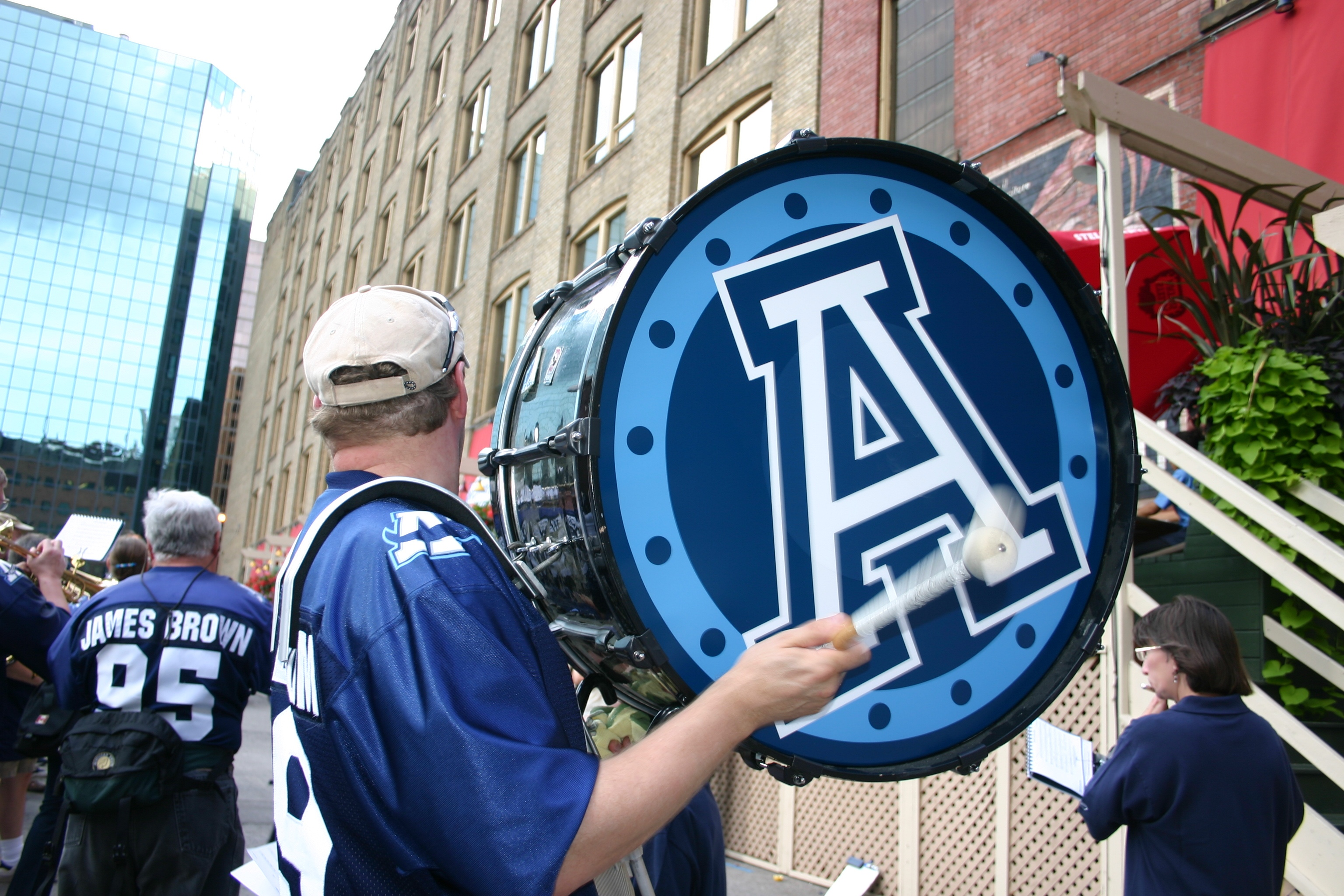 Argonotes drum.